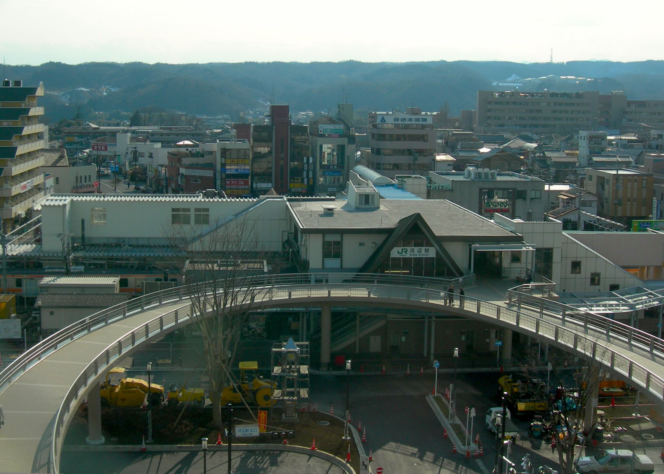 河辺駅北口